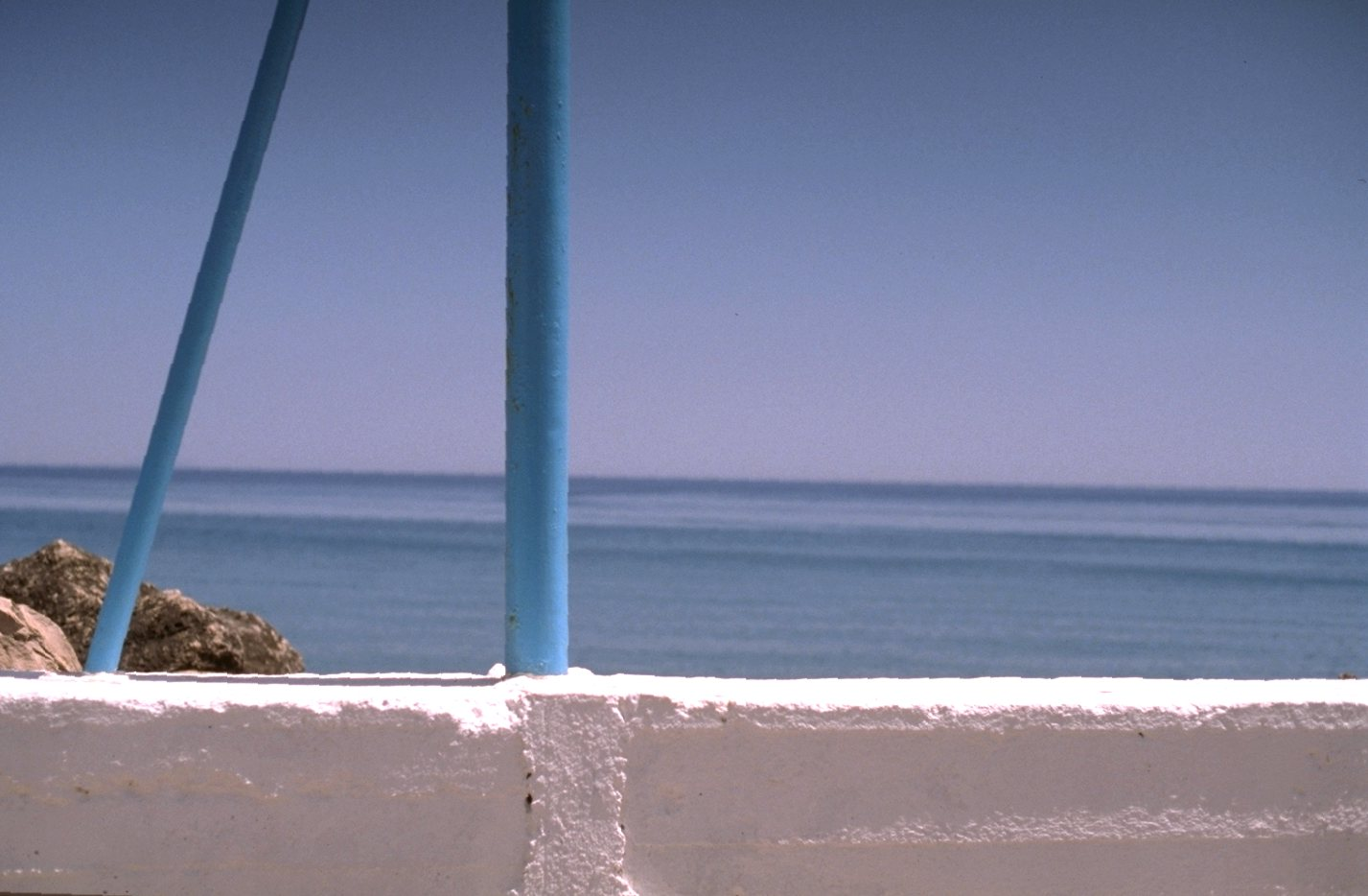 Paleochora, Kreta, Blick von der Promenade an der südlichen Küste der Halbinsel